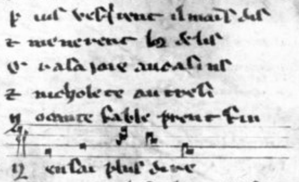 Manuscrit BNF français 2168 folio 80 recto (détail)